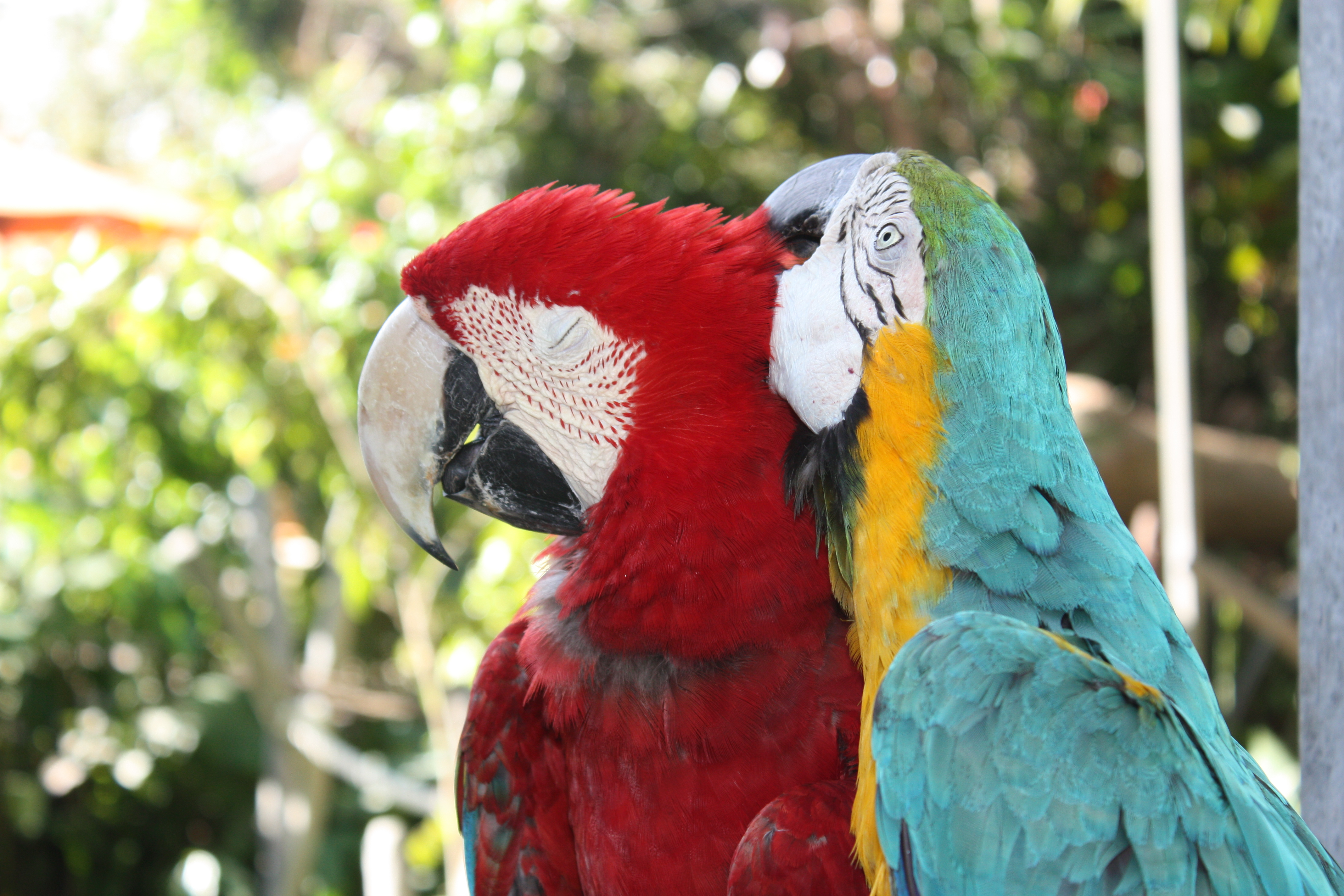 Macaws